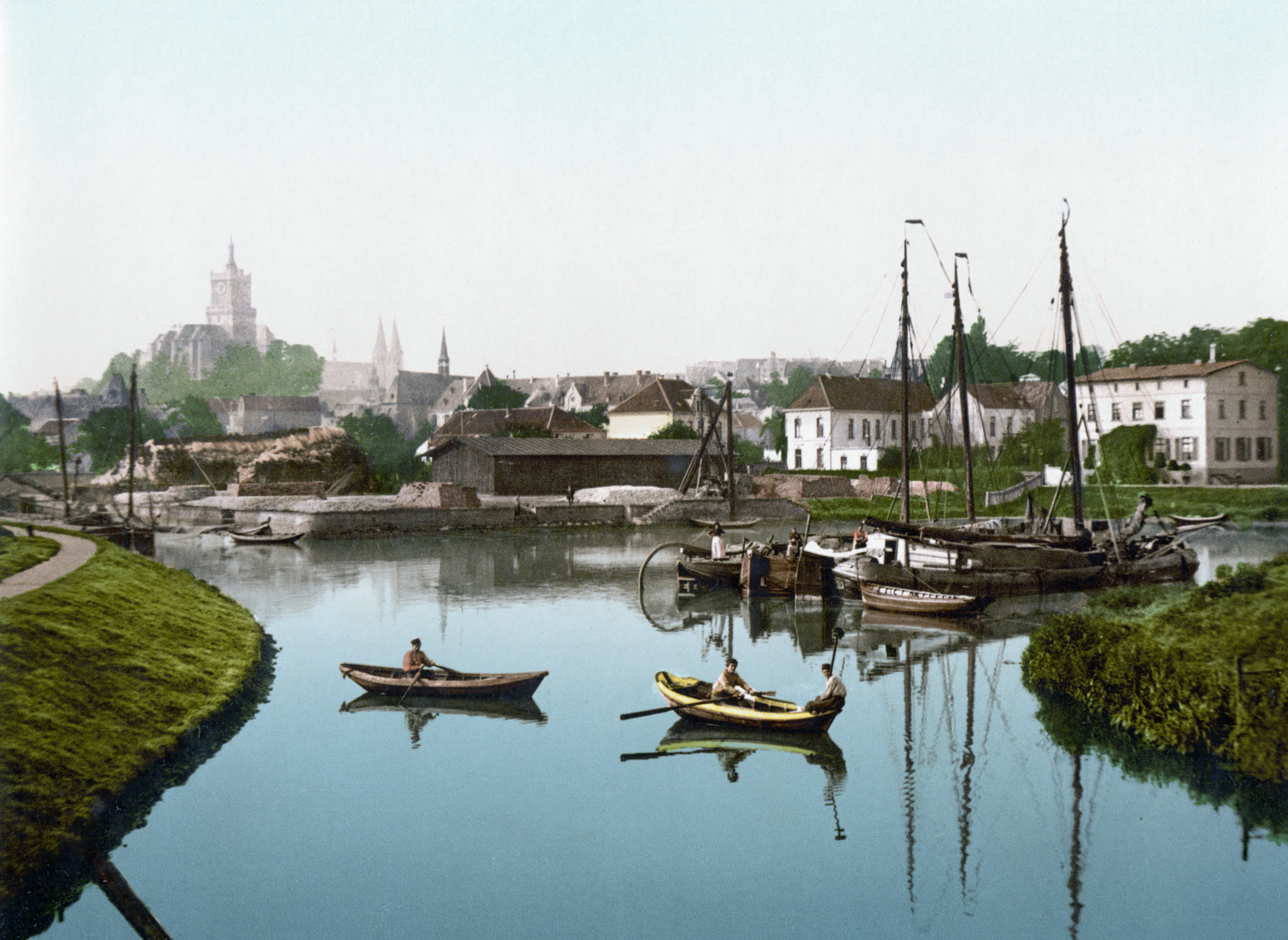 Kleve. Stadt und Hafen.